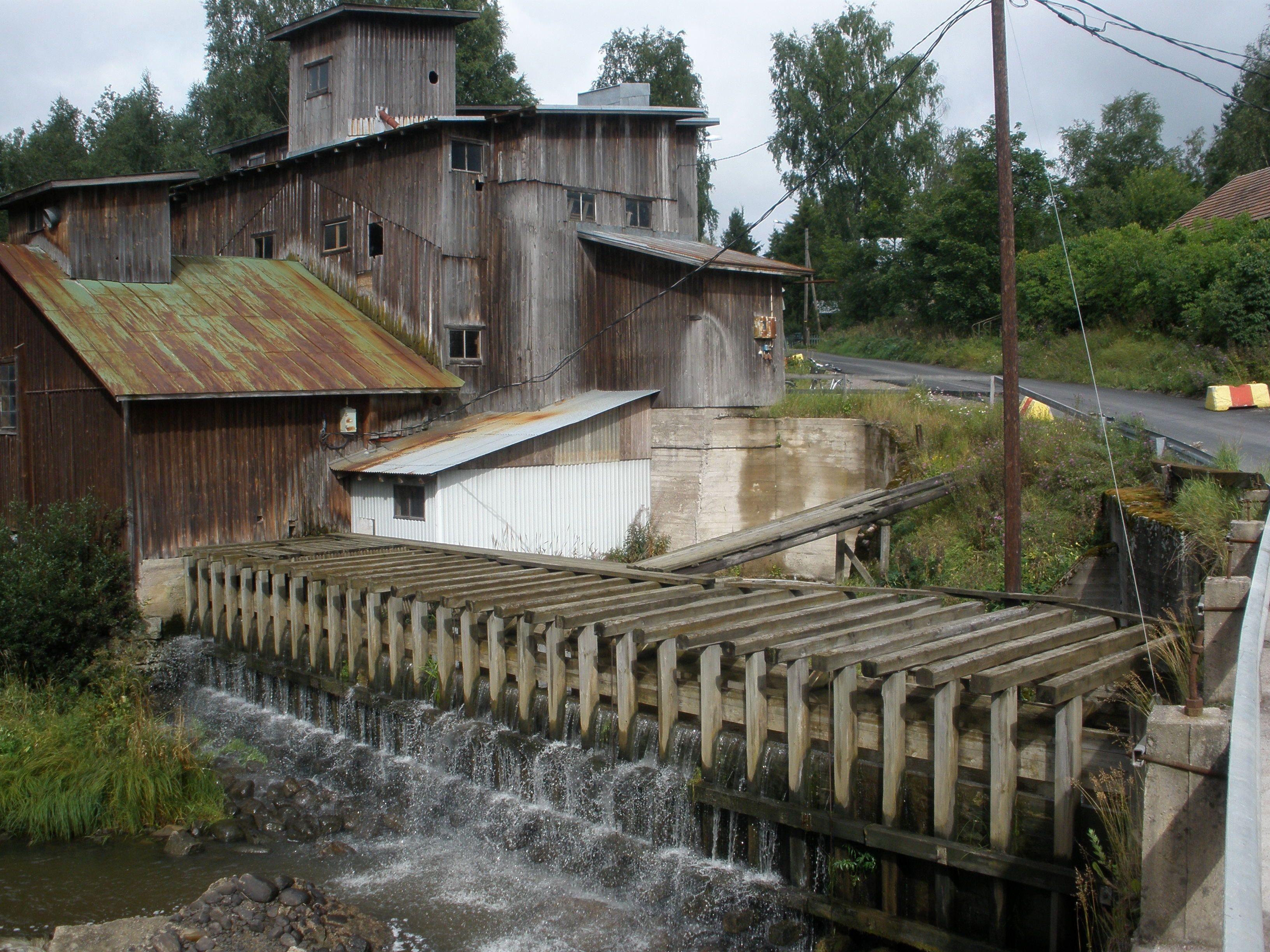 Old Mill from Haarajoki